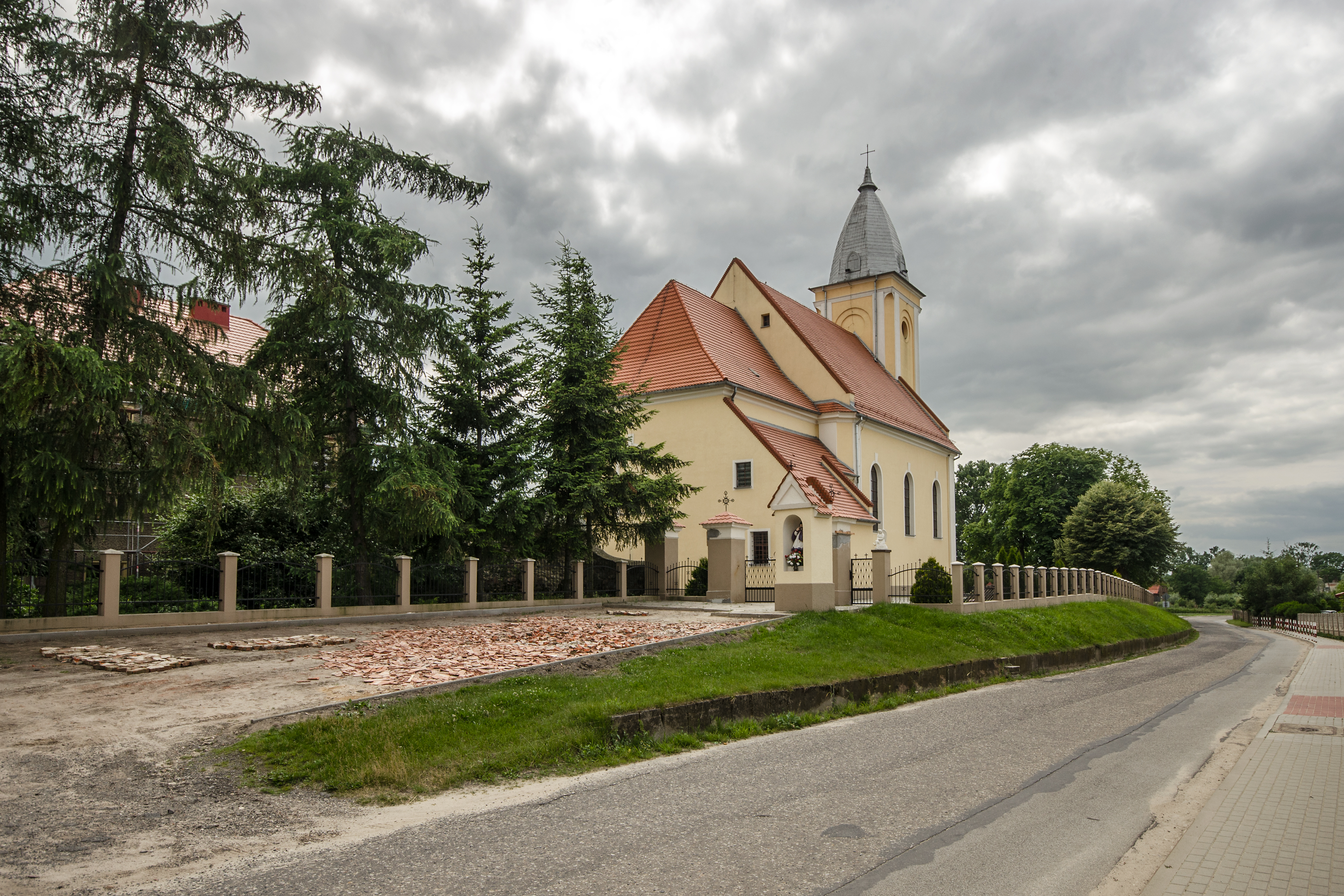 Krzyżowniki, kościół par. p.w. Nawiedzenia NMP, 1751